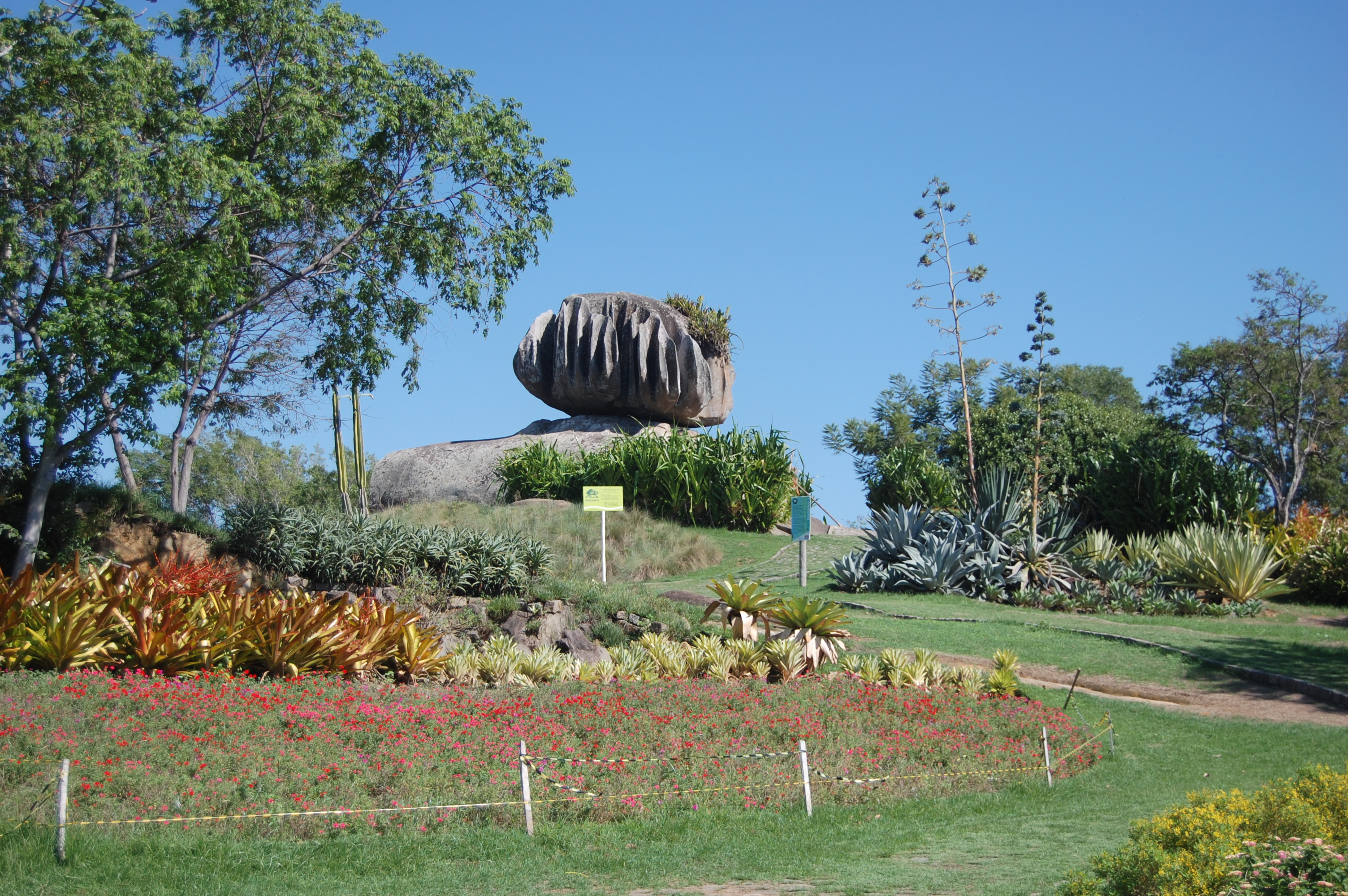 Parque Municipal Pedra da Cebola.